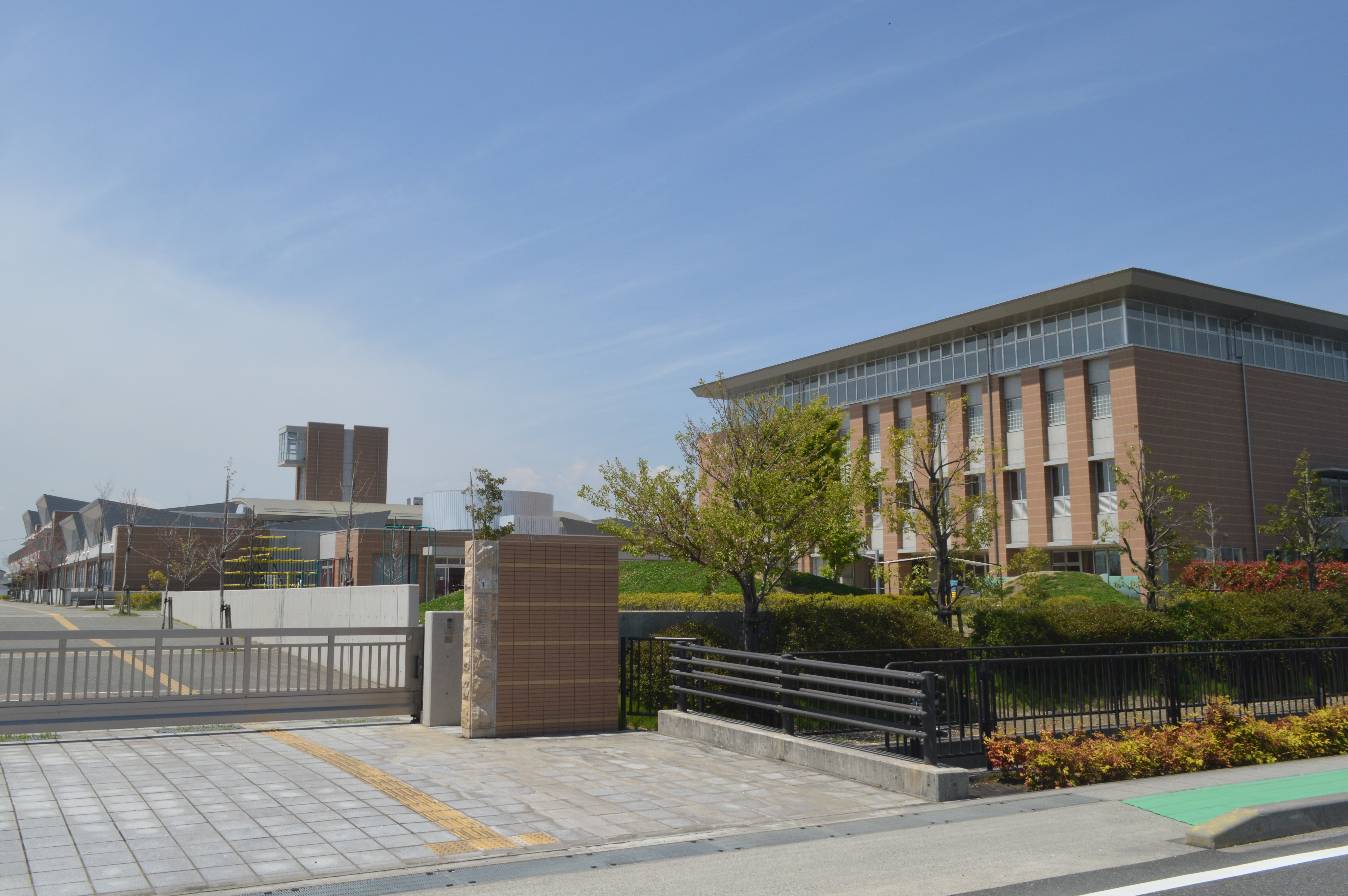 愛知県海部郡飛島村にある飛島学園（小中一貫校）。